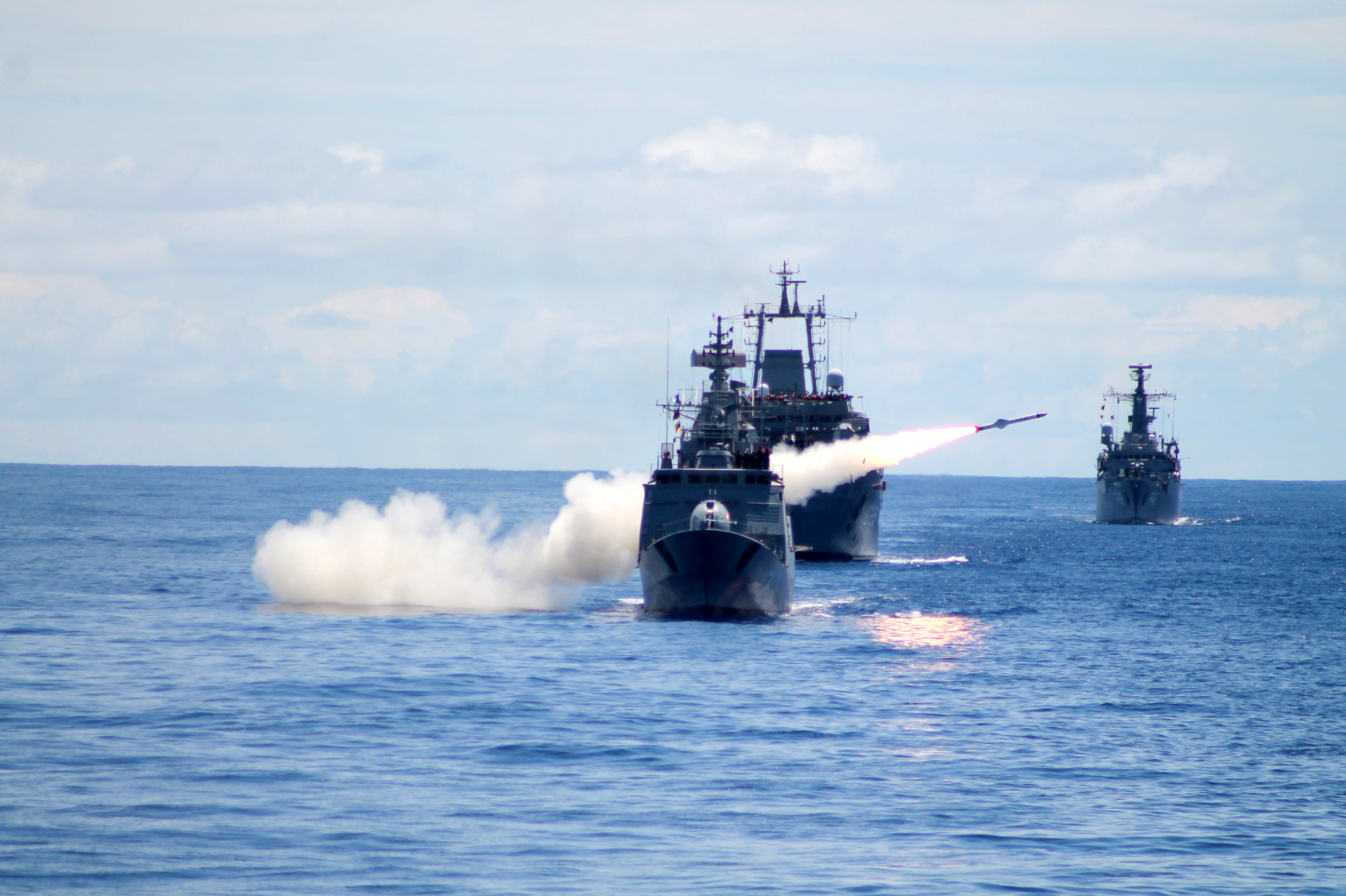 Arquivo liberado pela Marinha do Brasil através de projeto GLAM com Wiki Educação Brasil